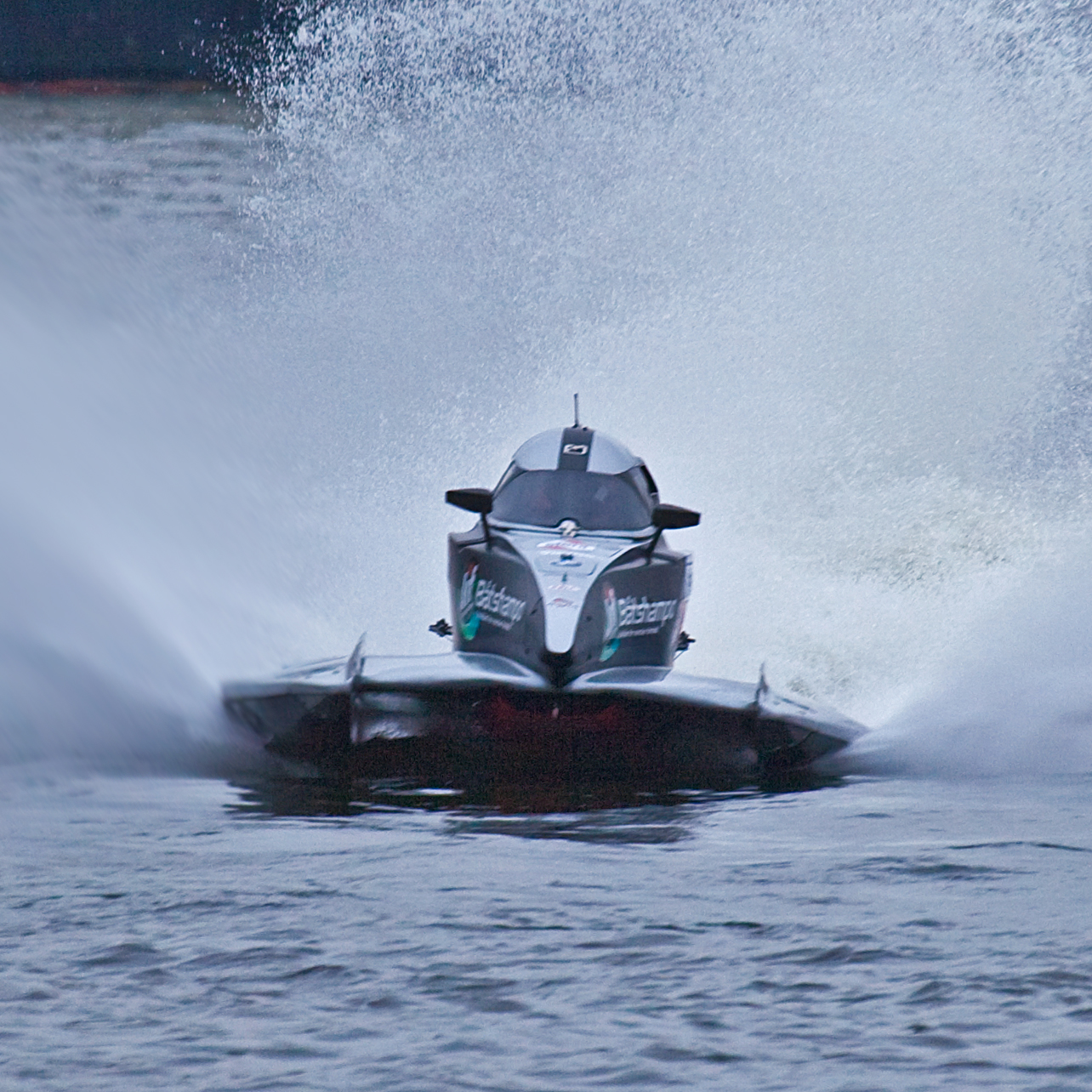 F2/F4 Worldchampionship on Riddarfjärden Stockholm June 2012